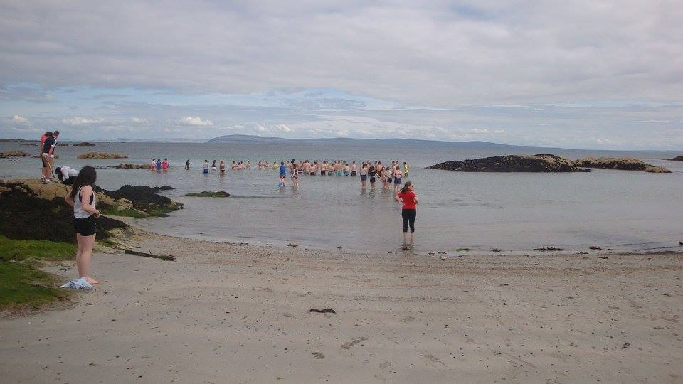 i took this photo when i attended the Gaeltacht